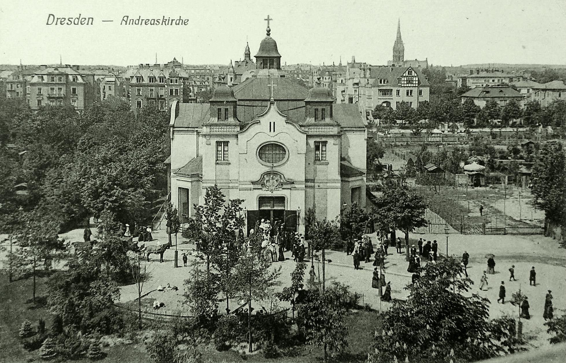 Andreaskirche in Dresden auf einer Postkarte: Kunstverlag Alfred Hartmann 1915